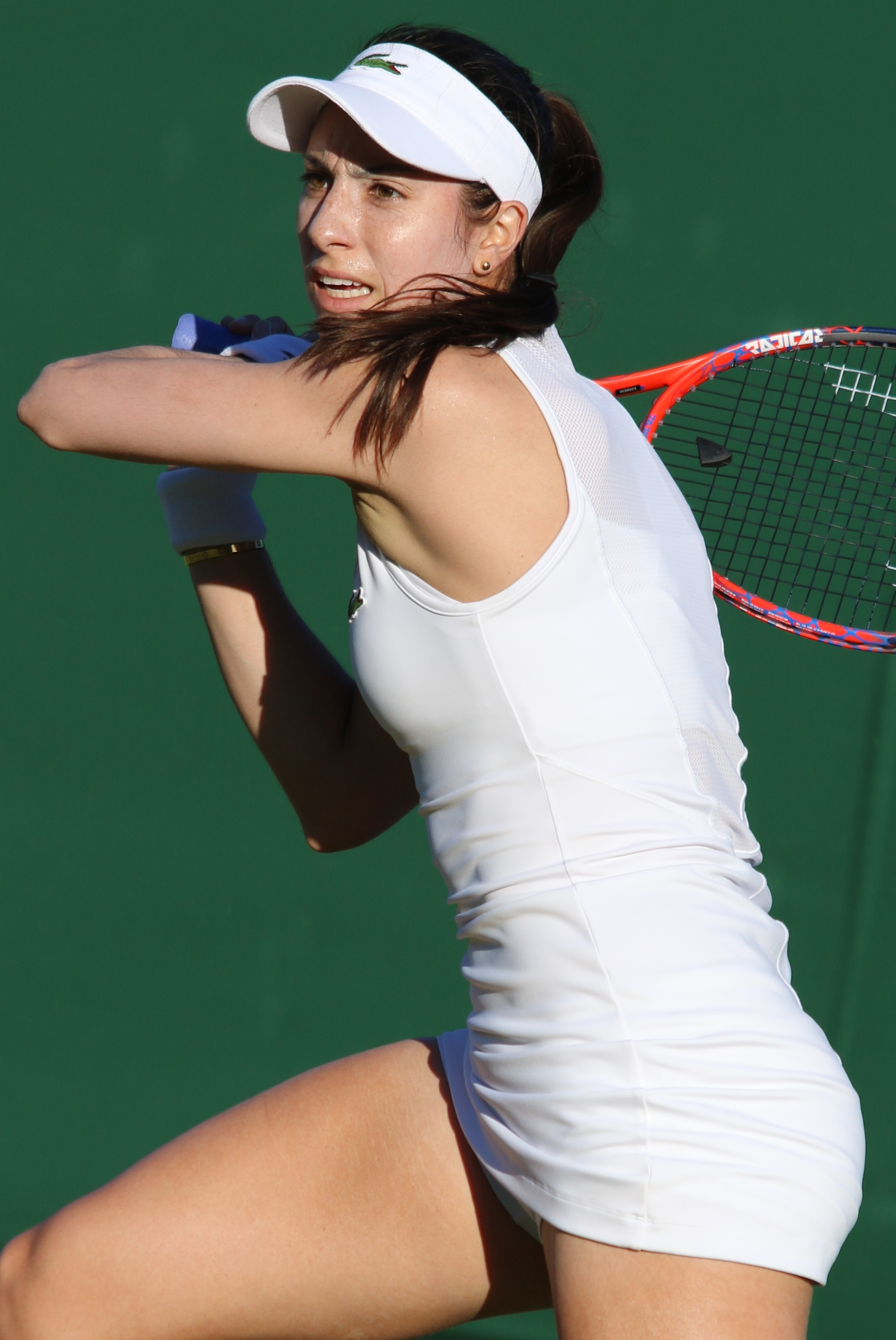 McHale WM18 (12)